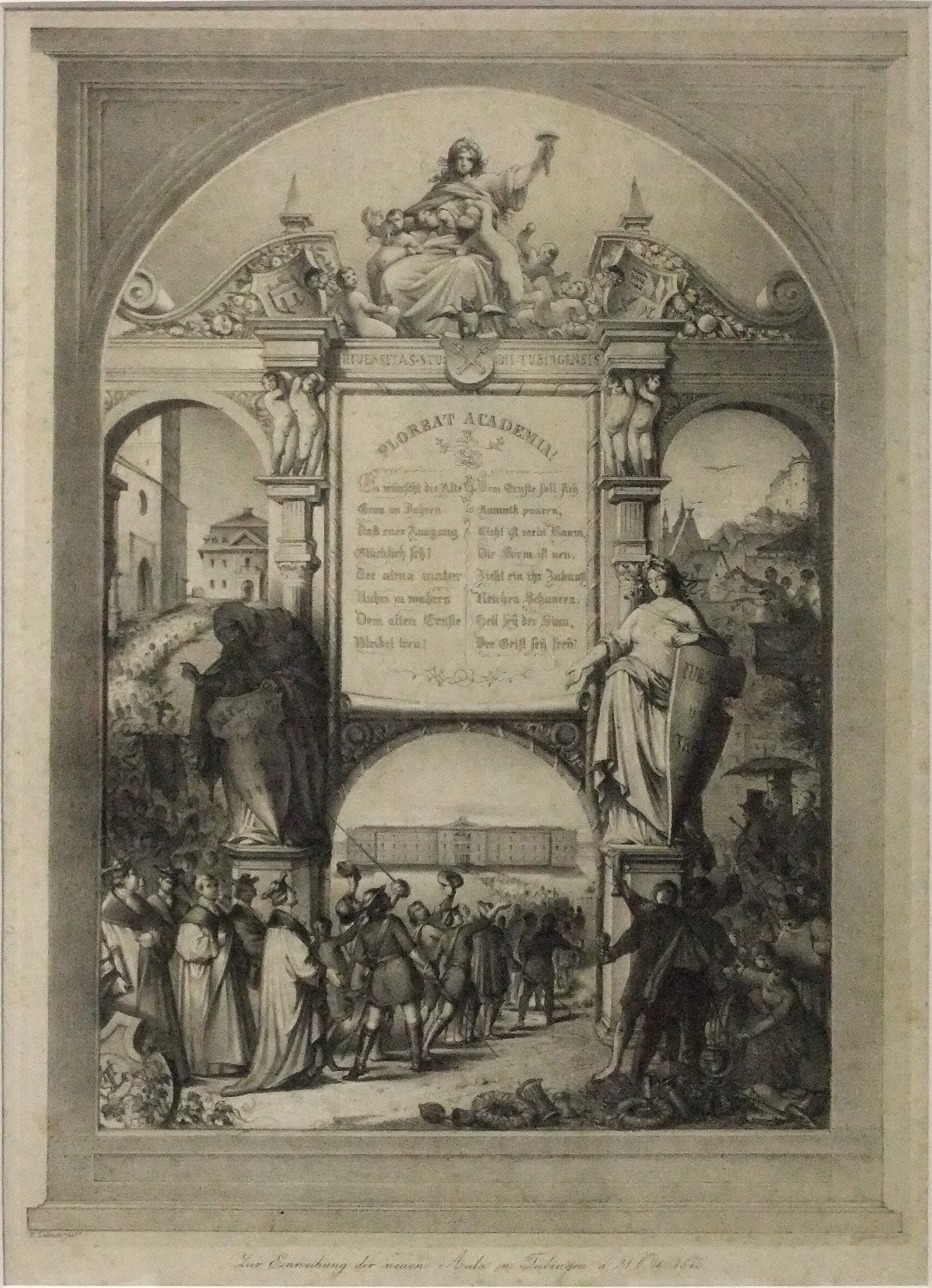 Zur Einweihung der Neuen Aula am 31. Oktober 1845 (Lithographie, 1845) Unter dem Bogen „Floreat Academia!“ steht: „Es wünscht die Alte Grau an Jahren / daß euer Ausgang / Glücklich sey! / Der alma mater / Ruhm zu wahren / Dem alten Ernste / Bleibet treu!“